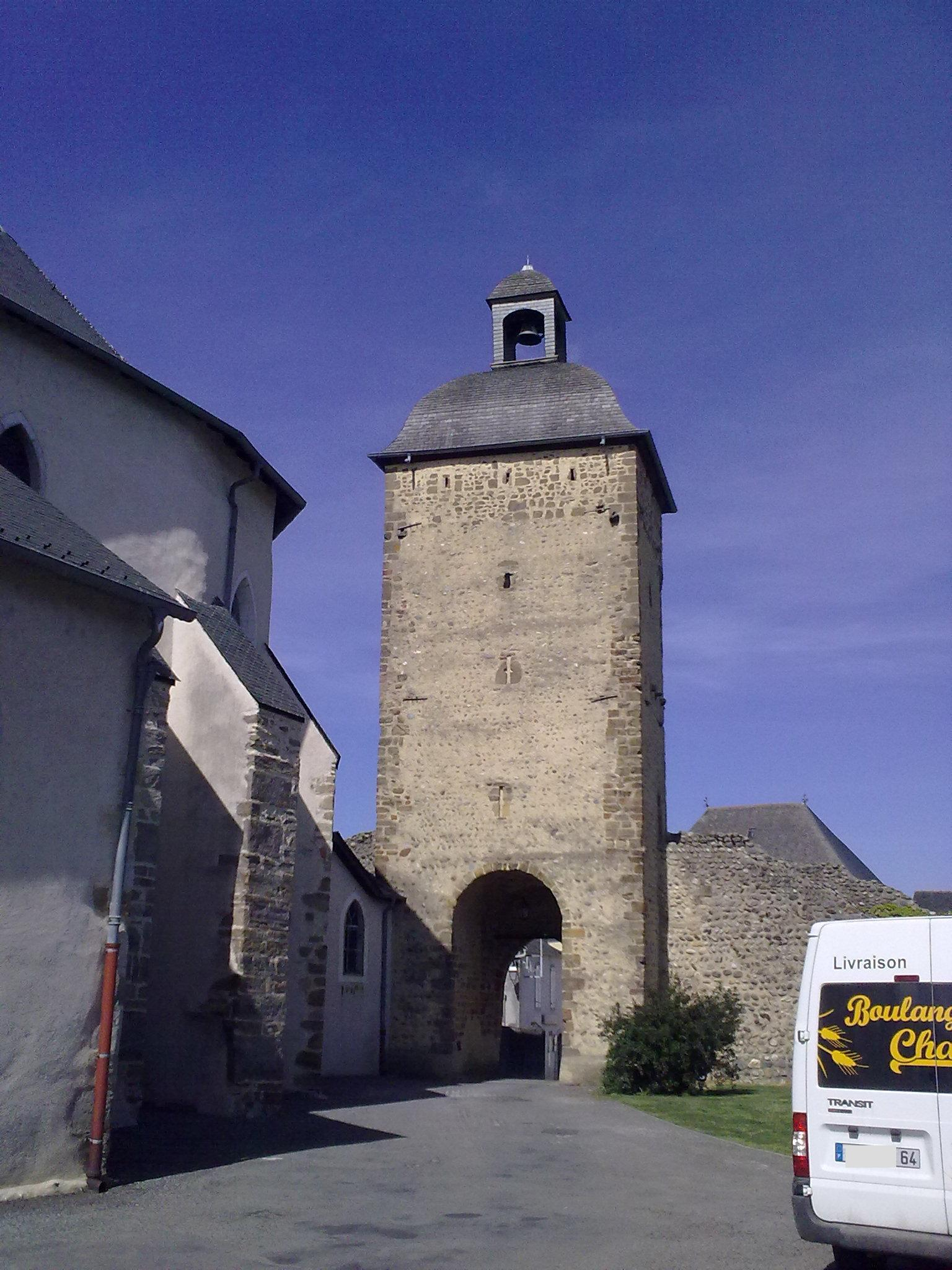 Tour de la monnaie, Pontacq, France